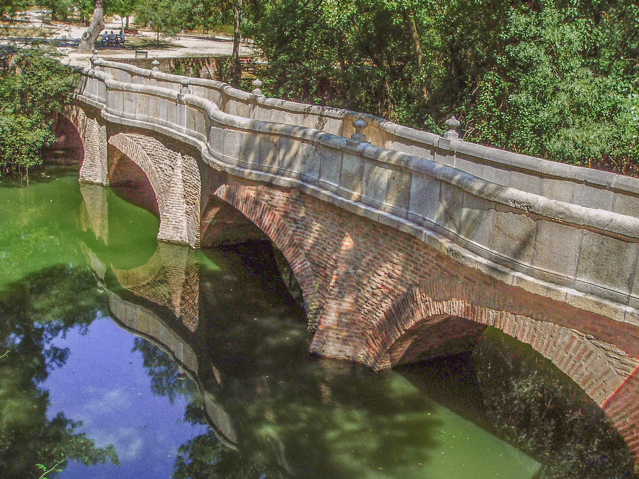 Puente de la Culebra. Casa de Campo. Madrid. España